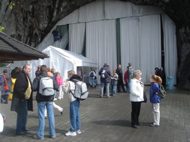 Front Festspiele Balver Höhle in 2005